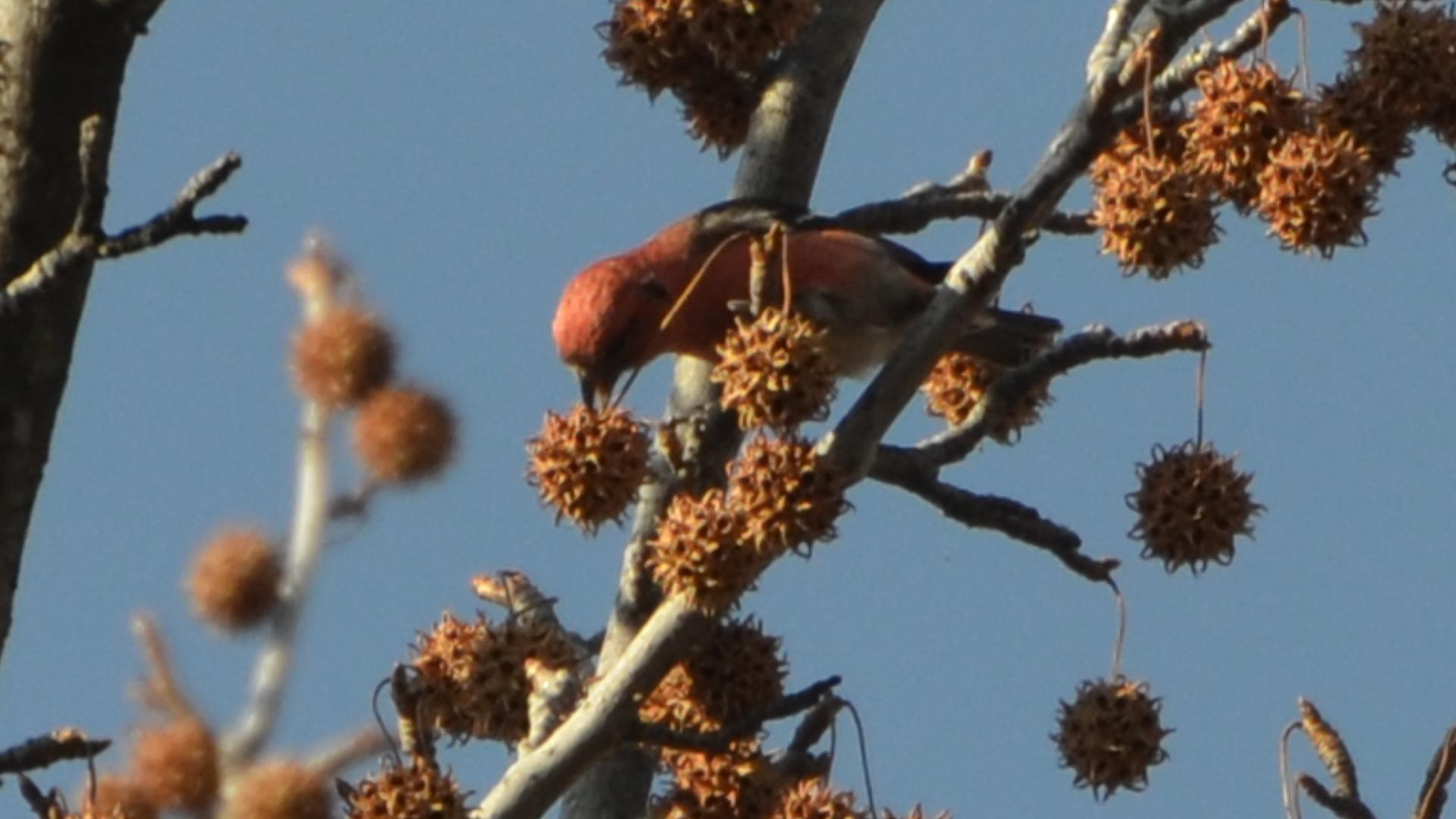 Faust Park (Chesterfield MO) on 11/27/12